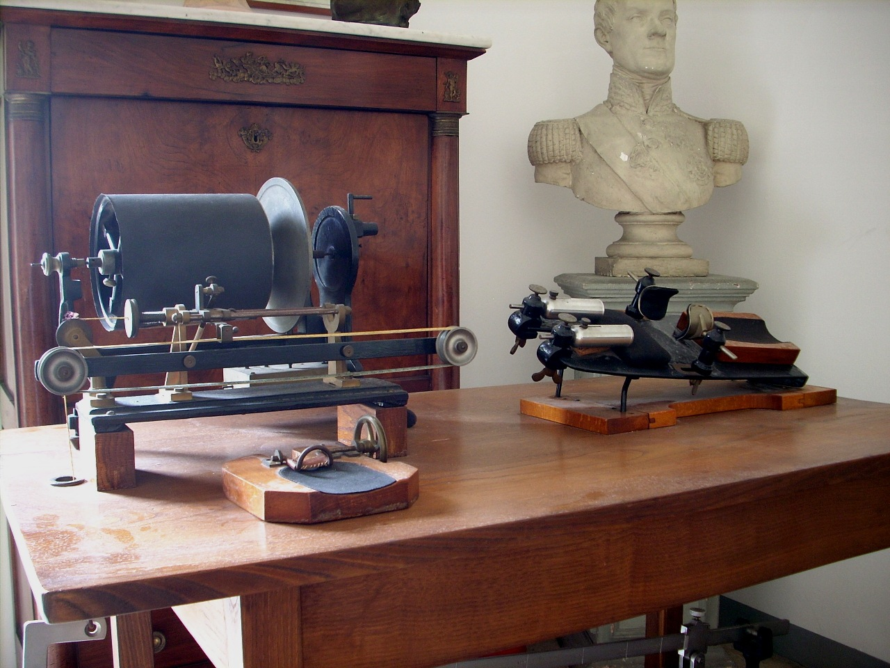 L'ergografo originale progettato e utilizzato da Angelo Mosso durante i suoi studi, oggi conservato all'Accademia di Medicina di Torino.